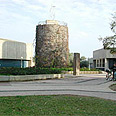 Kibbut Beeri